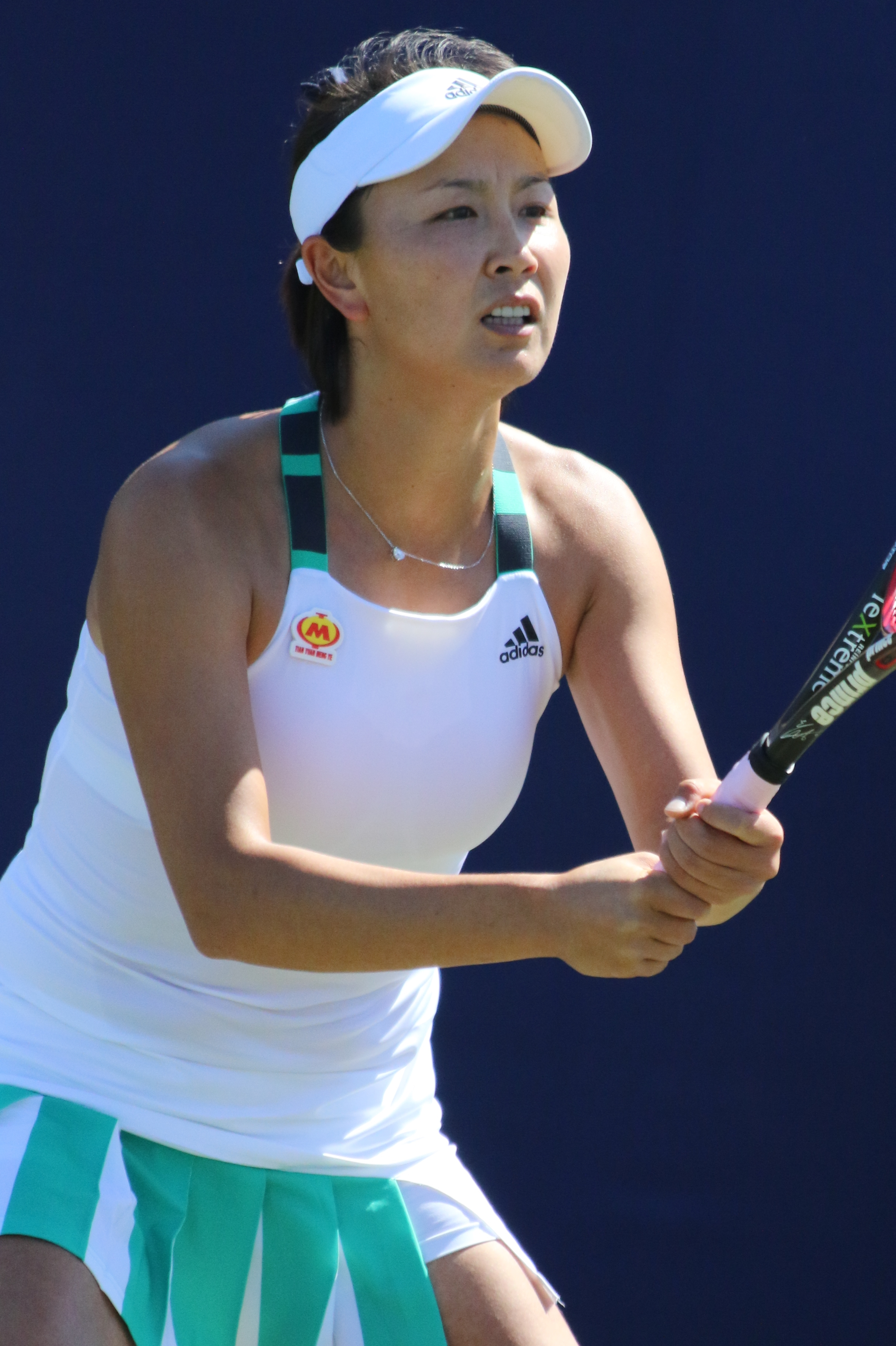 Peng EBN17 (7)